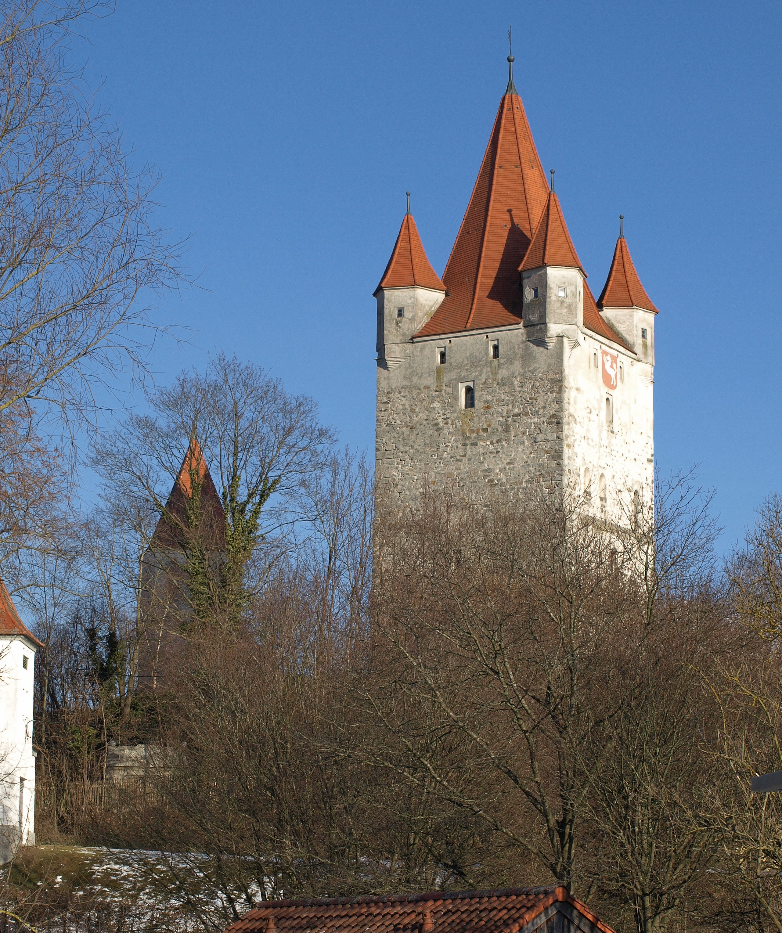 Schlossturm der Burg Haag in Haag in Oberbayern